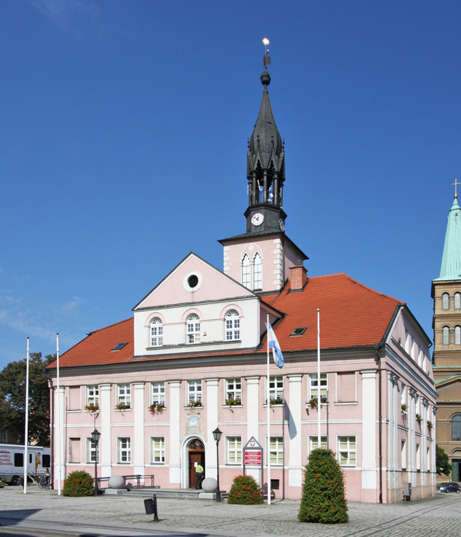 Międzyrzecz, ratusz, mur., 1813